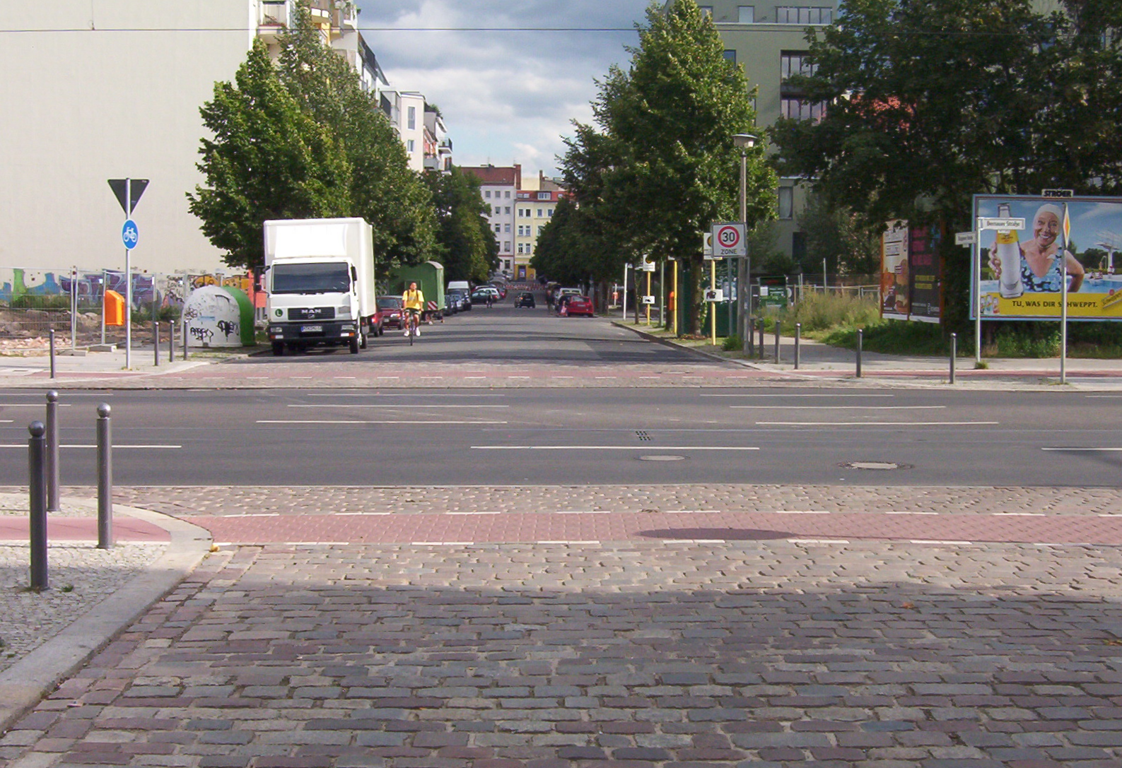 Die Kreuzung Bernauer Str.-Ruppiner Str. in Berlin. An dieser Stelle sprang Conrad Schumann 1961 über eine Stacheldrahtrolle nach Westberlin